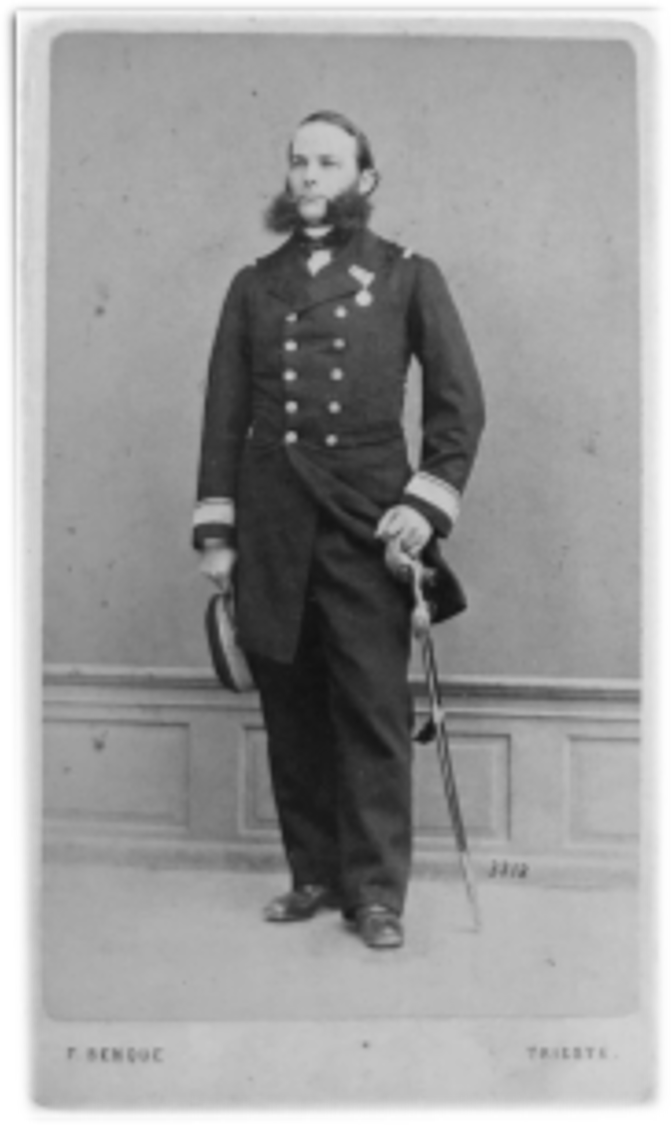 K.K. Korvettenkapitän Ludwig von Eberle, Foto von 1877.